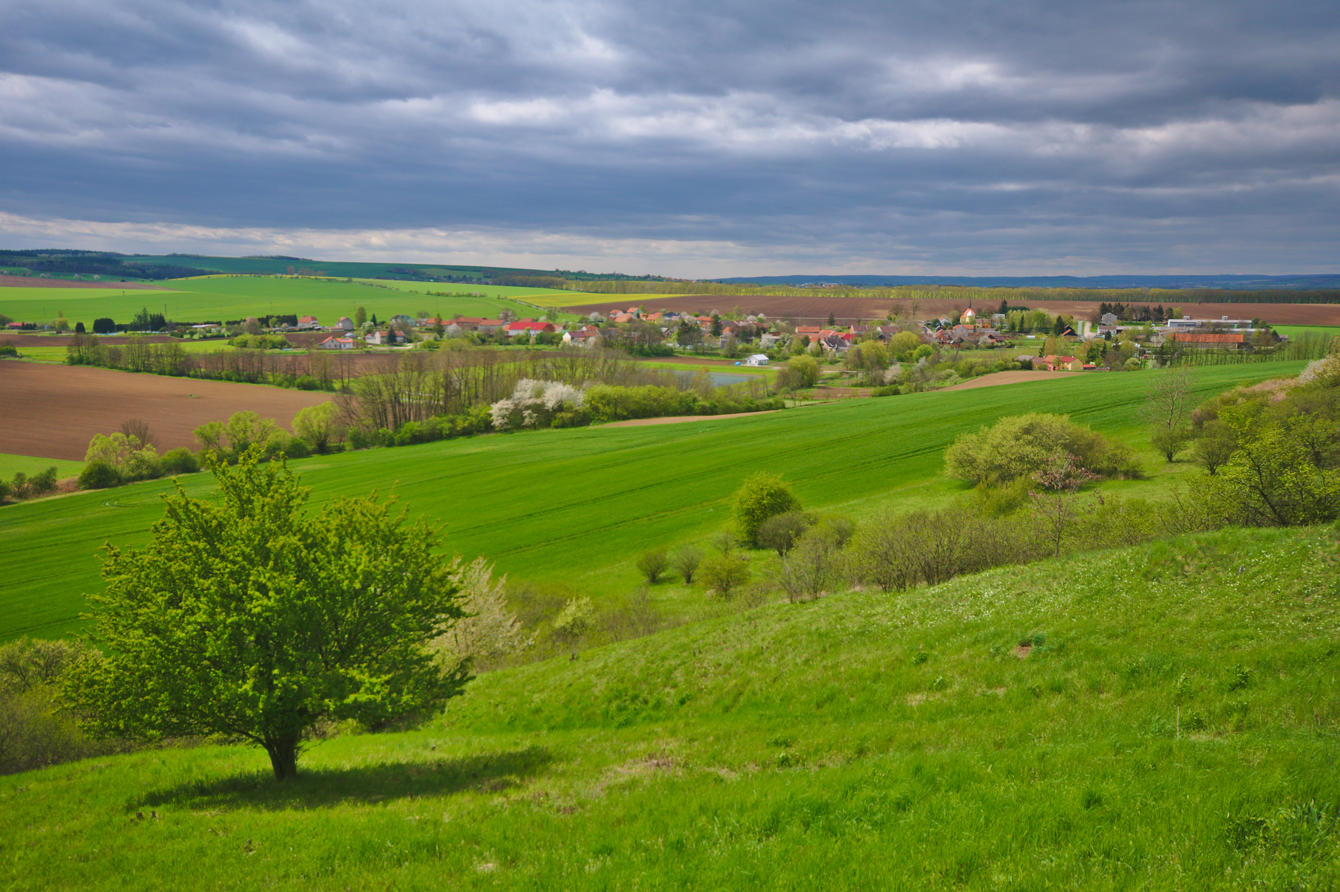 Národní přírodní památka Křéby, okres Kroměříž